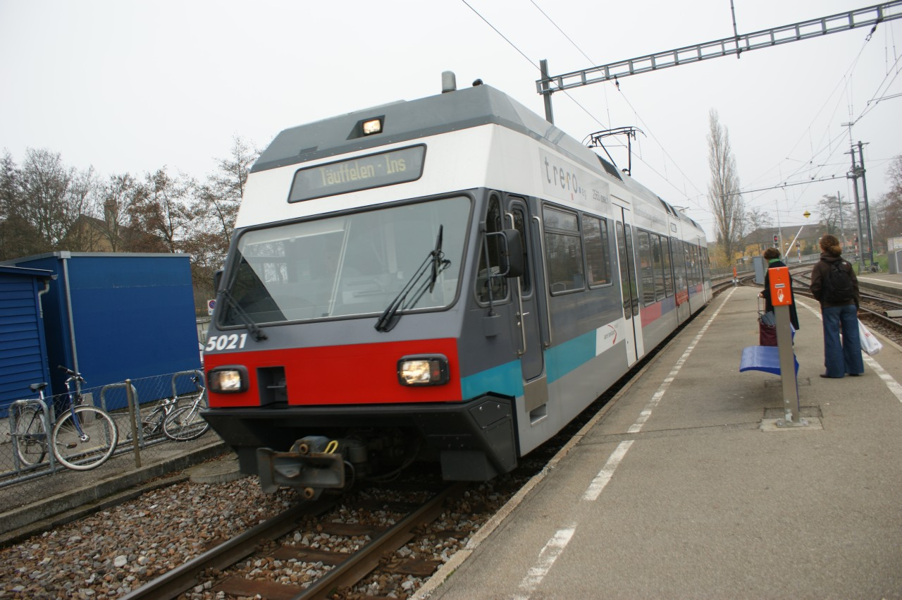 ASm Be 2/6 502 (die Urform des Stadler GTW) in Nidau